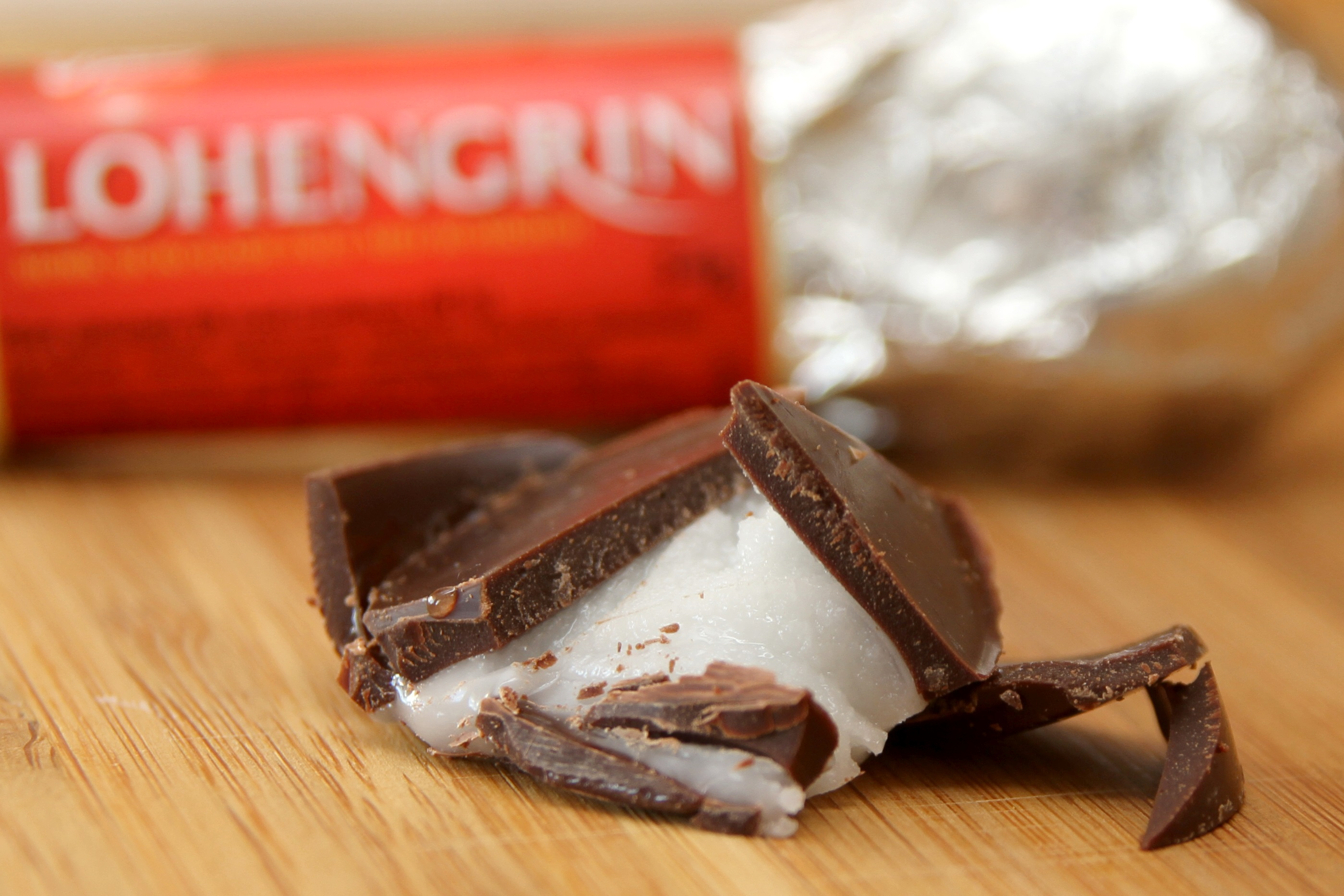 Sjokoladen Lohengrin.